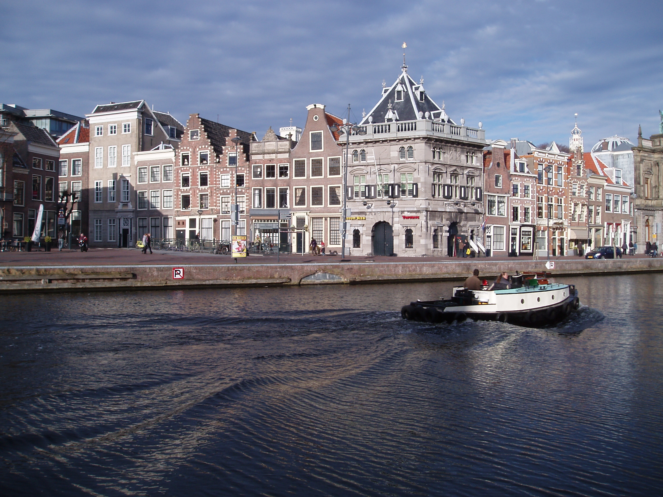 De voormalige uitmonding van de Beek in het Spaarne, met de Waag op de achtergrond.